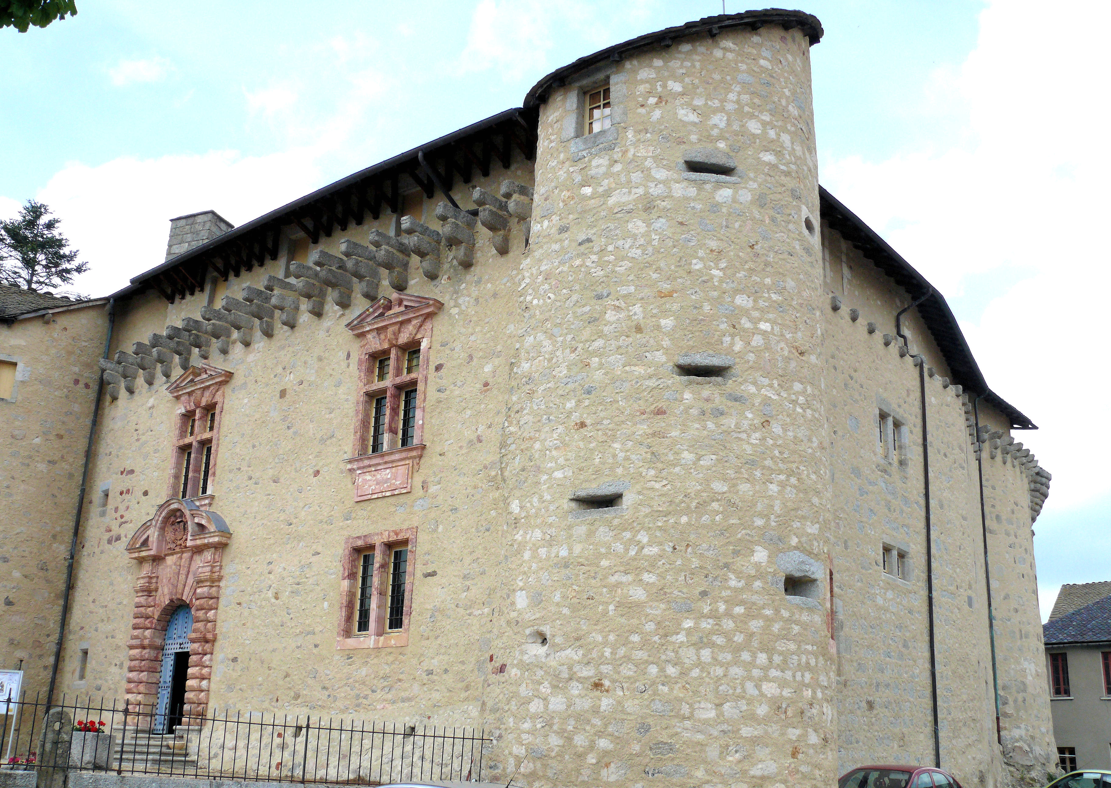 Saint-Alban-sur-Limagnole - Château - Façades sud et est